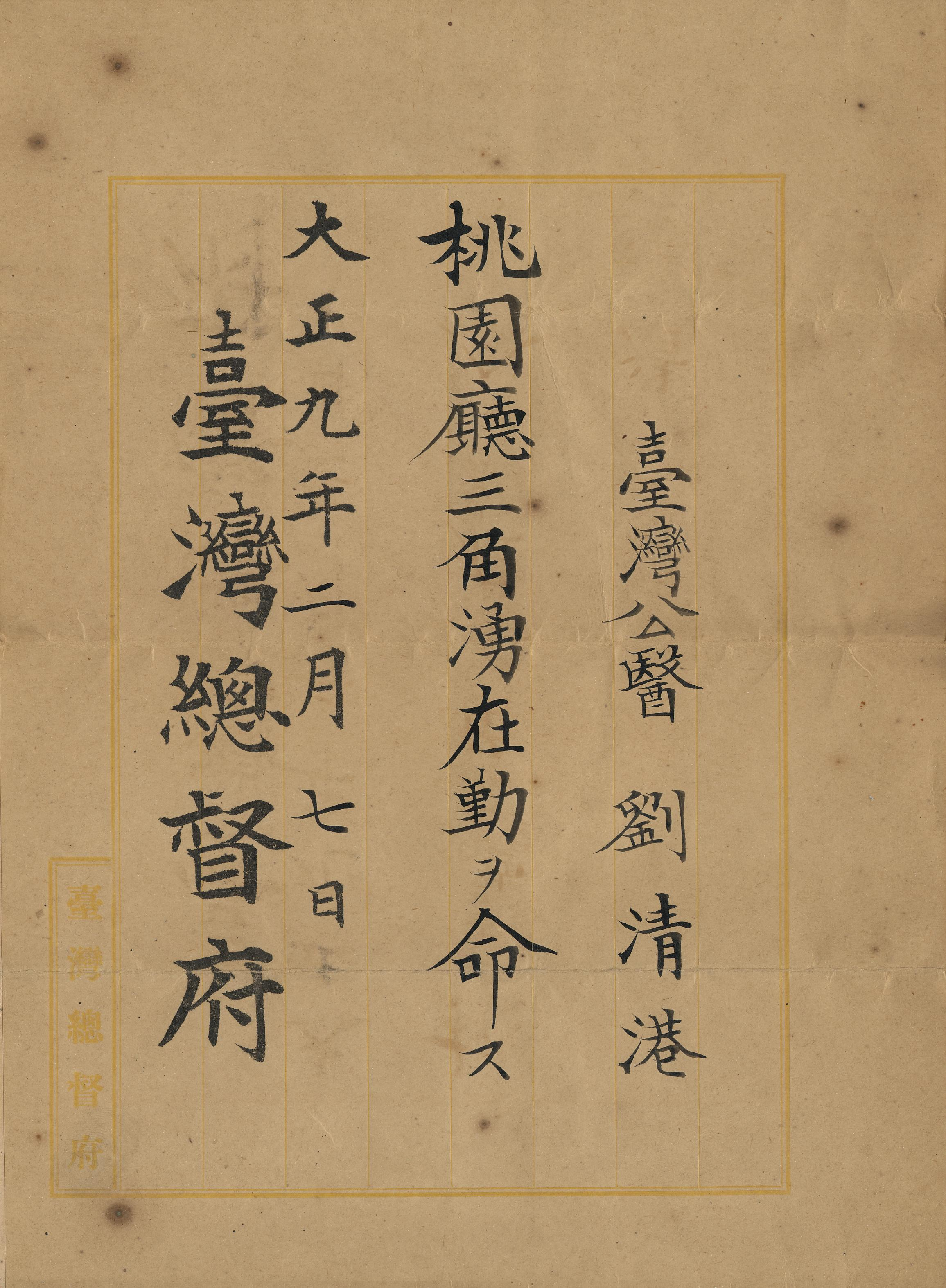 大正九年(1920)，臺灣總督府任命劉清港醫師為桃園廳三角湧公醫